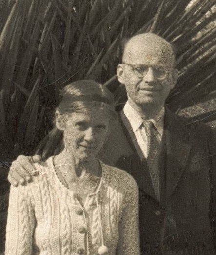 Der Lutherische Pastor und Theologie-Professor Paul Leo und seine zweite Frau Eva Leo, Metallbildnerin